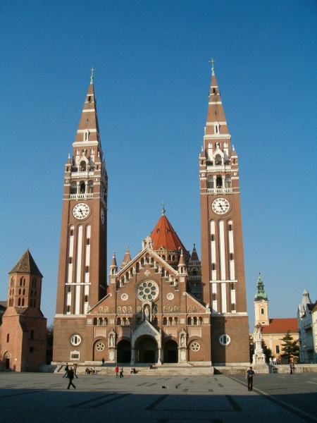 Szeged, Dóm